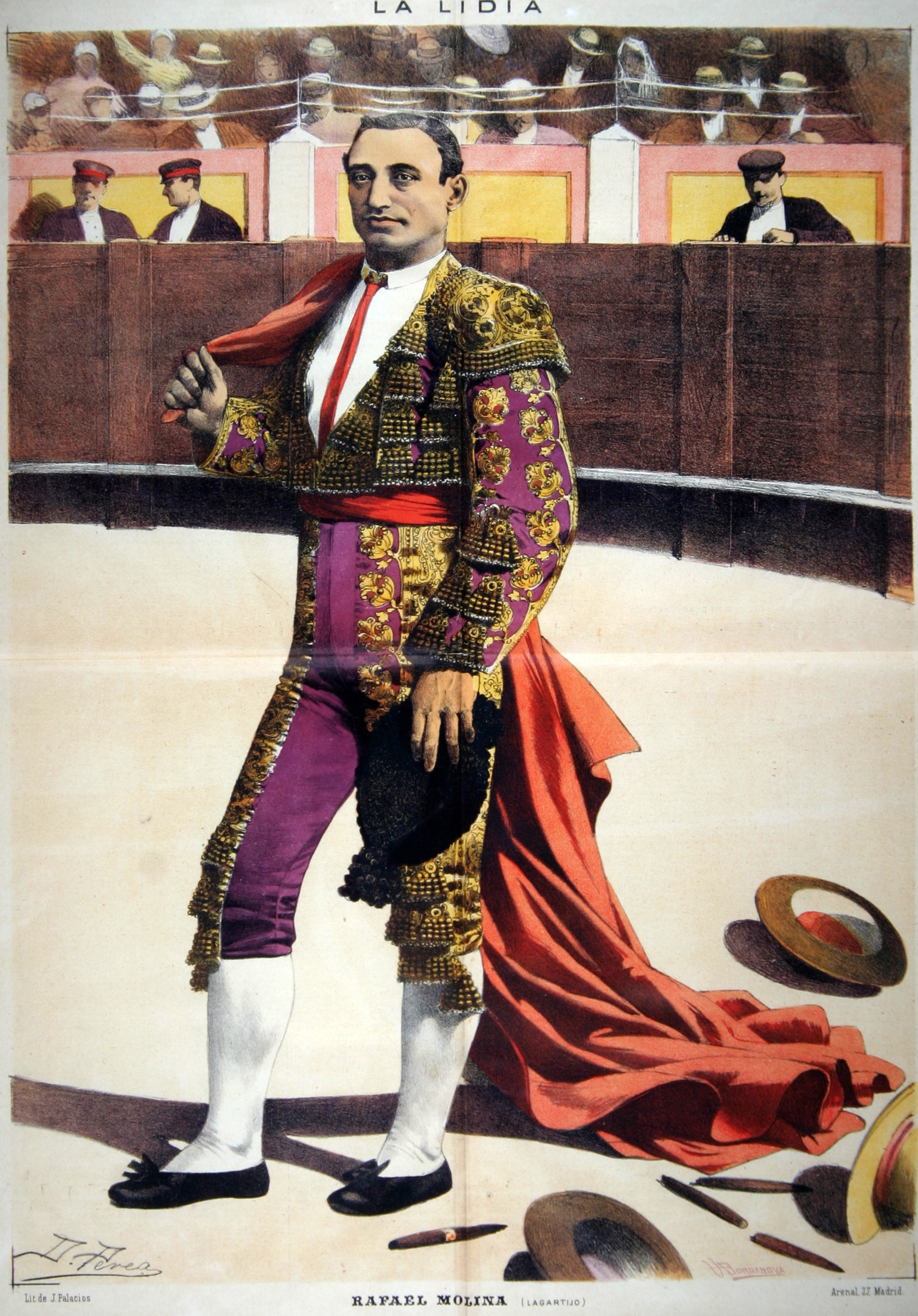 Rafael Molina Sánchez, Lagartijo, en el remate de una larga por alto o cordobesa. Litografía de J. Palacios y dibujo de Daniel Perea. Revista La Lidia, siglo XIX.